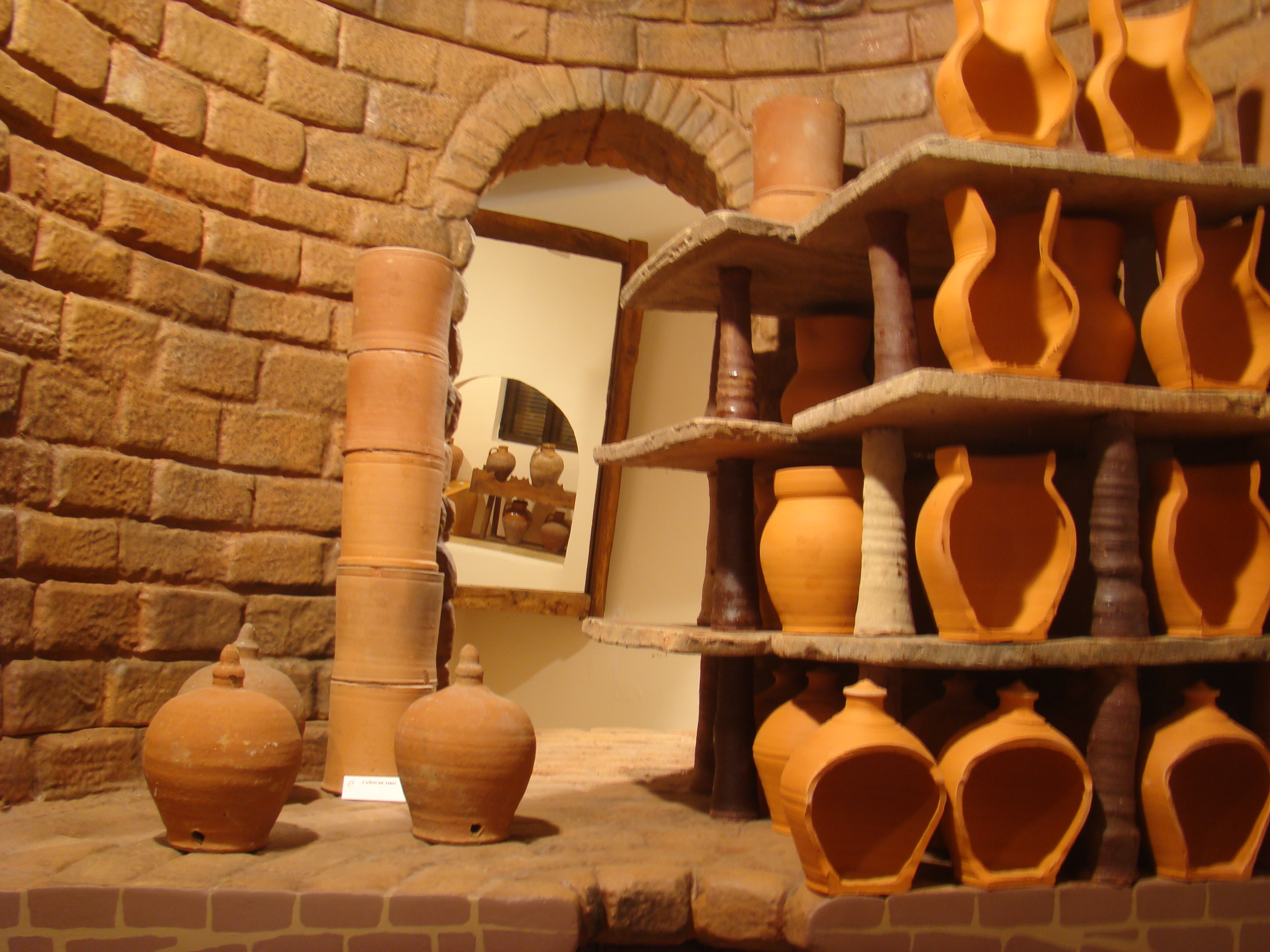 Museo del cántaro en la localidad de Valoria la Buena en la provincia de Valladolid, España. Horno hispano-árabe.